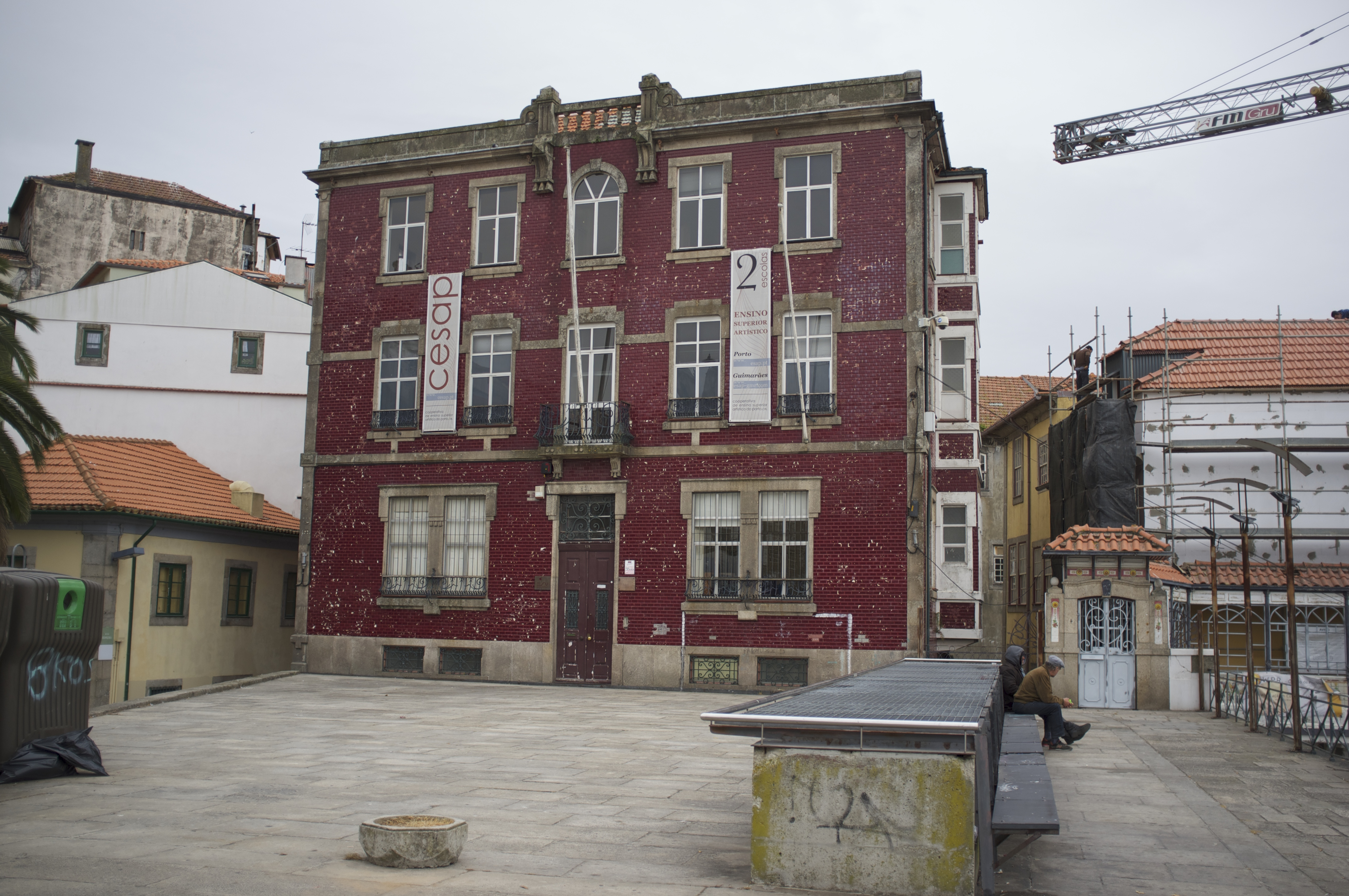 Porto